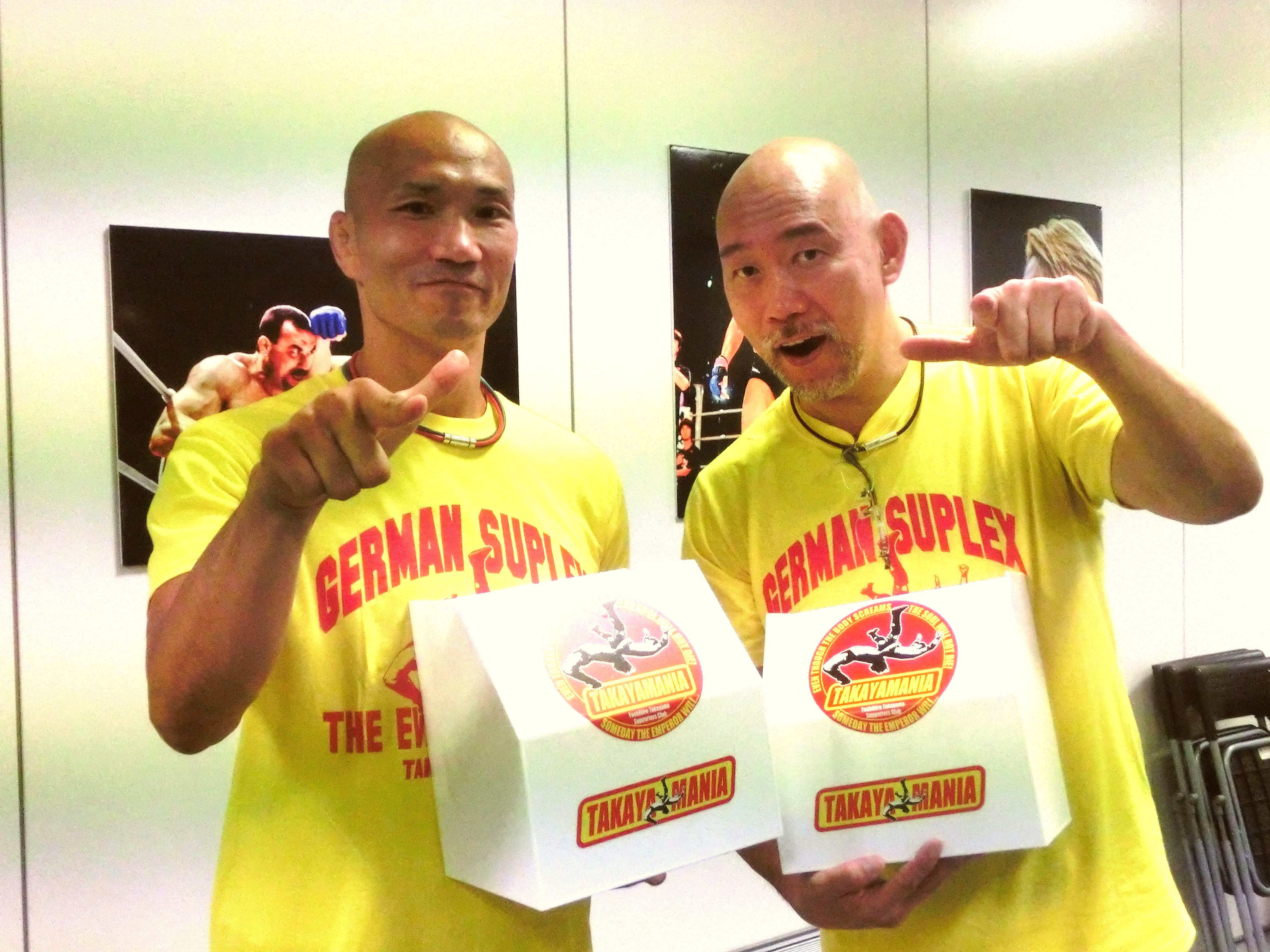 2018年8月31日、後楽園ホール